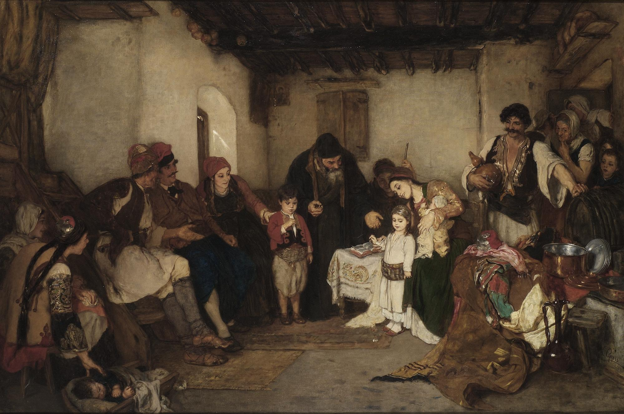 Νικόλαος Γύζης Παιδικοί αρραβώνες 1877